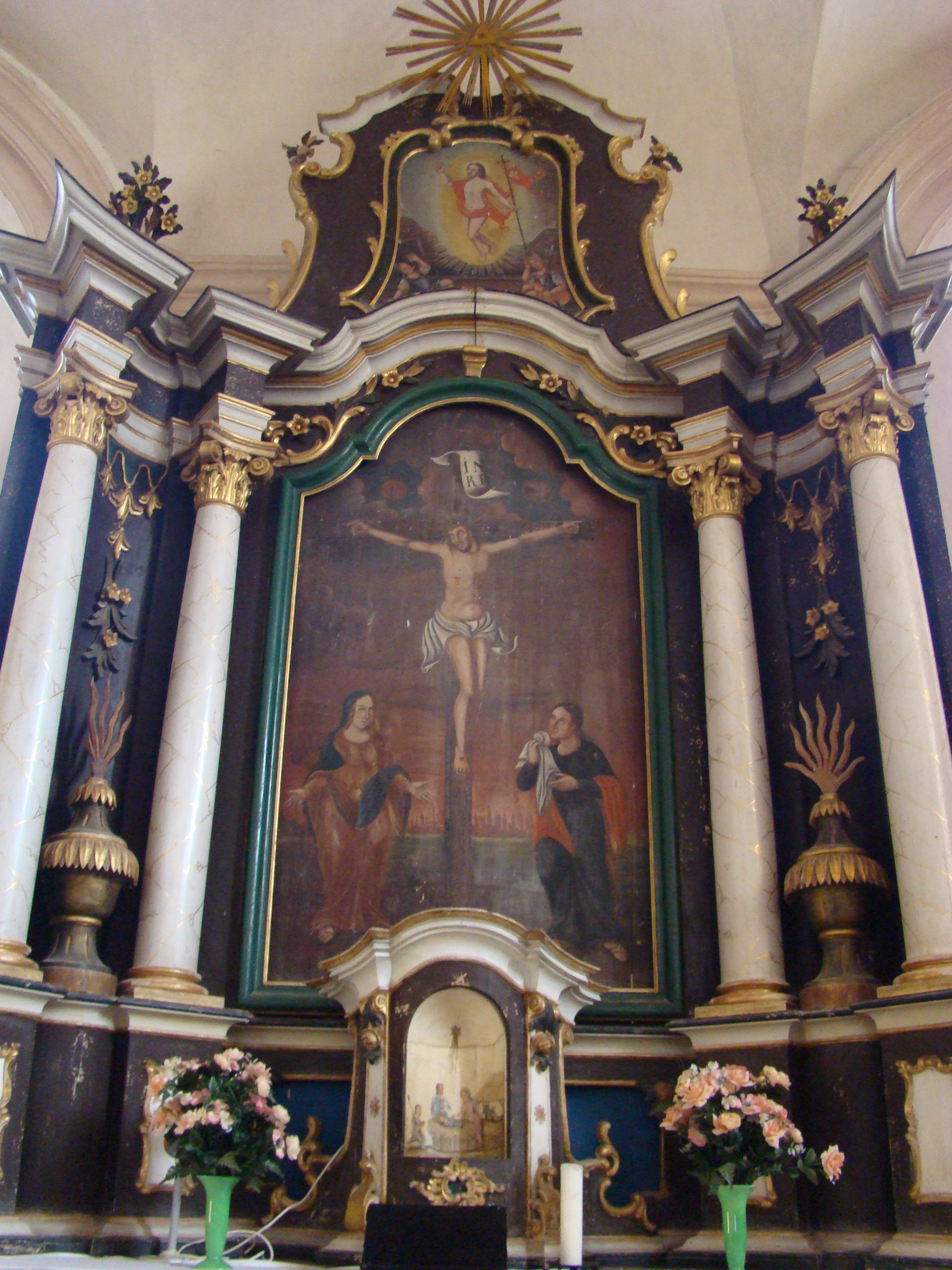 Biserica evanghelică, sat Zagăr; comuna Zagăr, județul Mureș 01